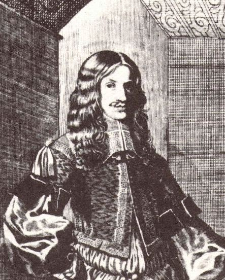 Ludwig VI., Landgraf von Hessen-Darmstadt